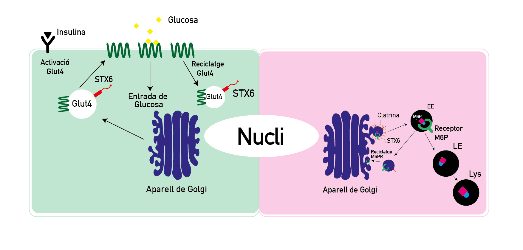 Transport vesicular regulat per la sintaxina-6. 1. La sintaxina-6 regula el transport de Glut4 a la membrana plasmàtica, permetent l'entrada de glucosa a la cèl•lula. 2. La sintaxina.6 regula la fusió entre vesícules que trasporten proteïnes marcades amb M6F, i EE, i participen en el transport retrògrad (retorn a les membranes del TGN) del M6FR.